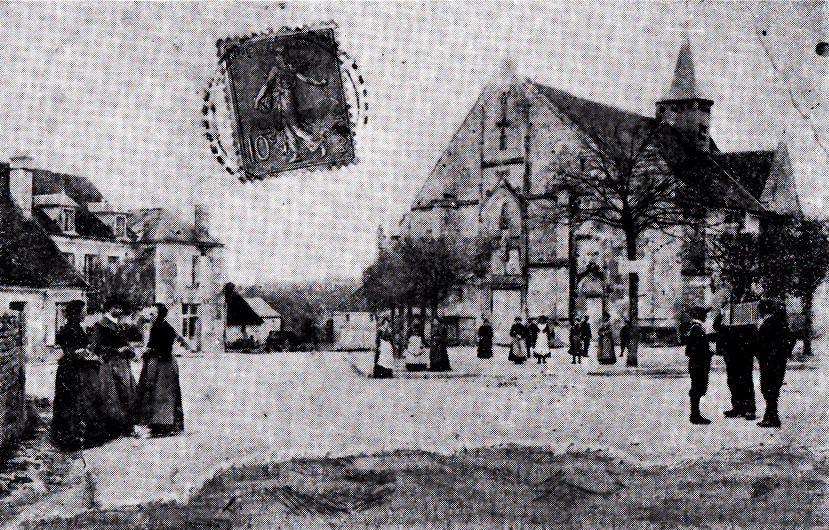 Place de l'église de Sougères-en-Puisaye au début du vingtième siècle.